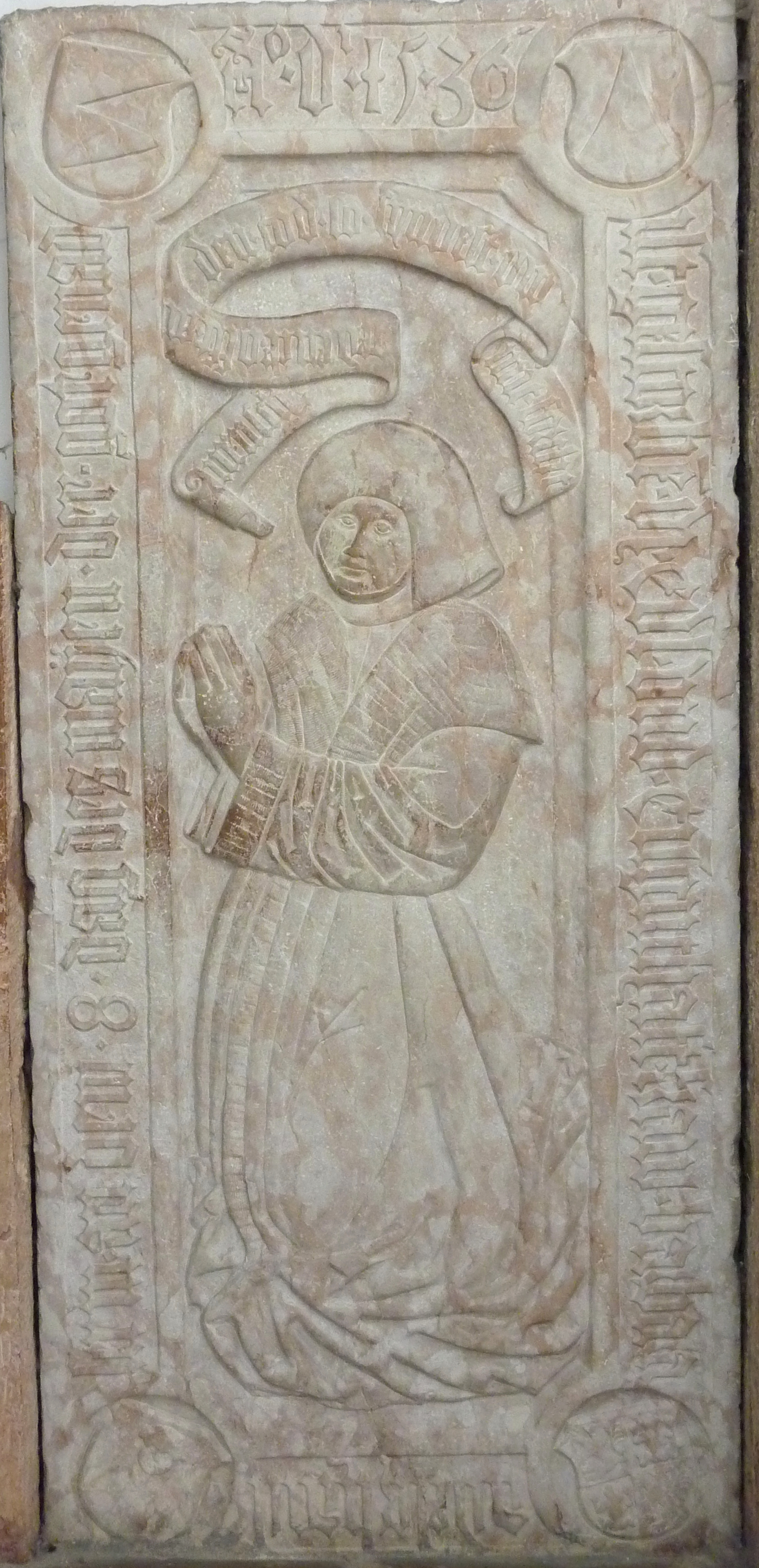 Katholische Pfarr- und Klosterkirche St. Alto und St. Birgitta in Altomünster im Landkreis Dachau (Bayern), Epitaph für Barbara von Adelzhausen († 1536)